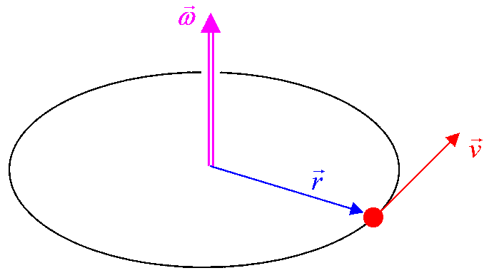 Winkelgeschwindigkeit als Vektor